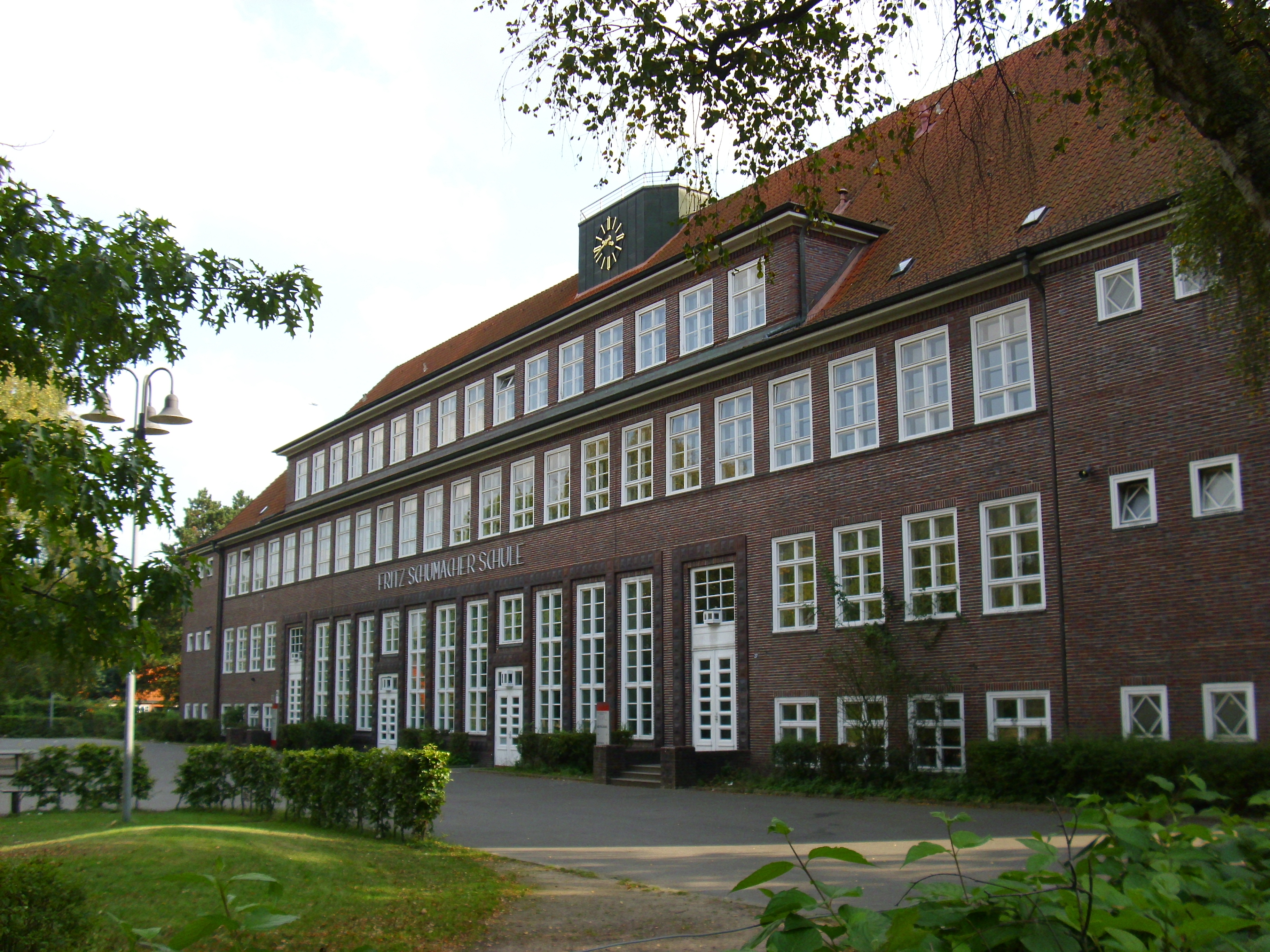 Fritz-Schumacher-Schule, Timmerloh 27, 29 This is a photograph of an architectural monument.